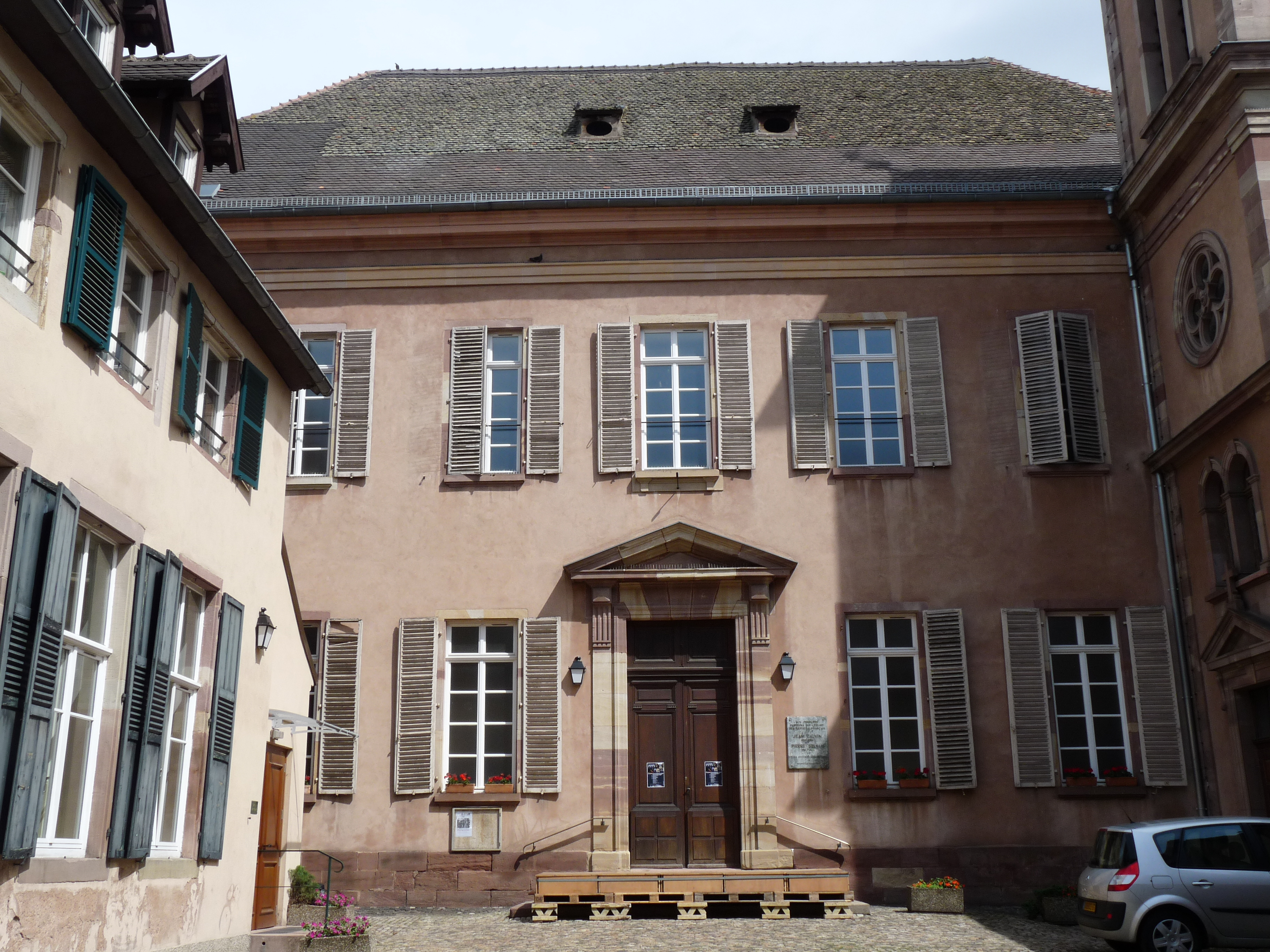 Strasbourg : Eglise réformée du Bouclier, 4, rue du Bouclier.